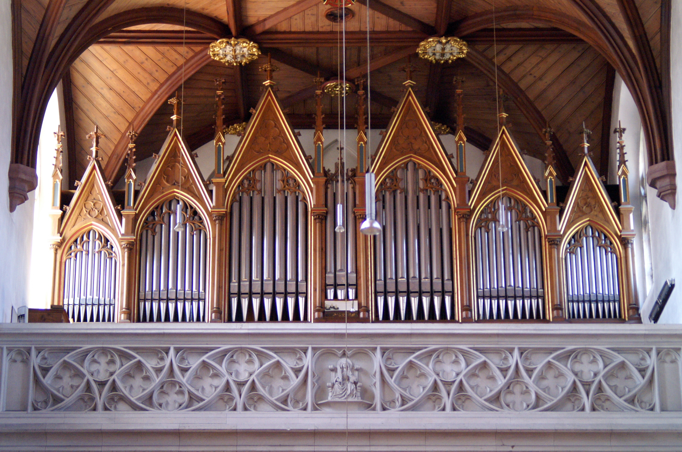 Orgel Mariä Himmelfahrt, Kelheim